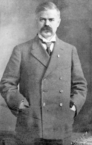 Шаповал_Микита_Юхимович, (8 червня (26 травня) 1882 — †25 лютого 1932